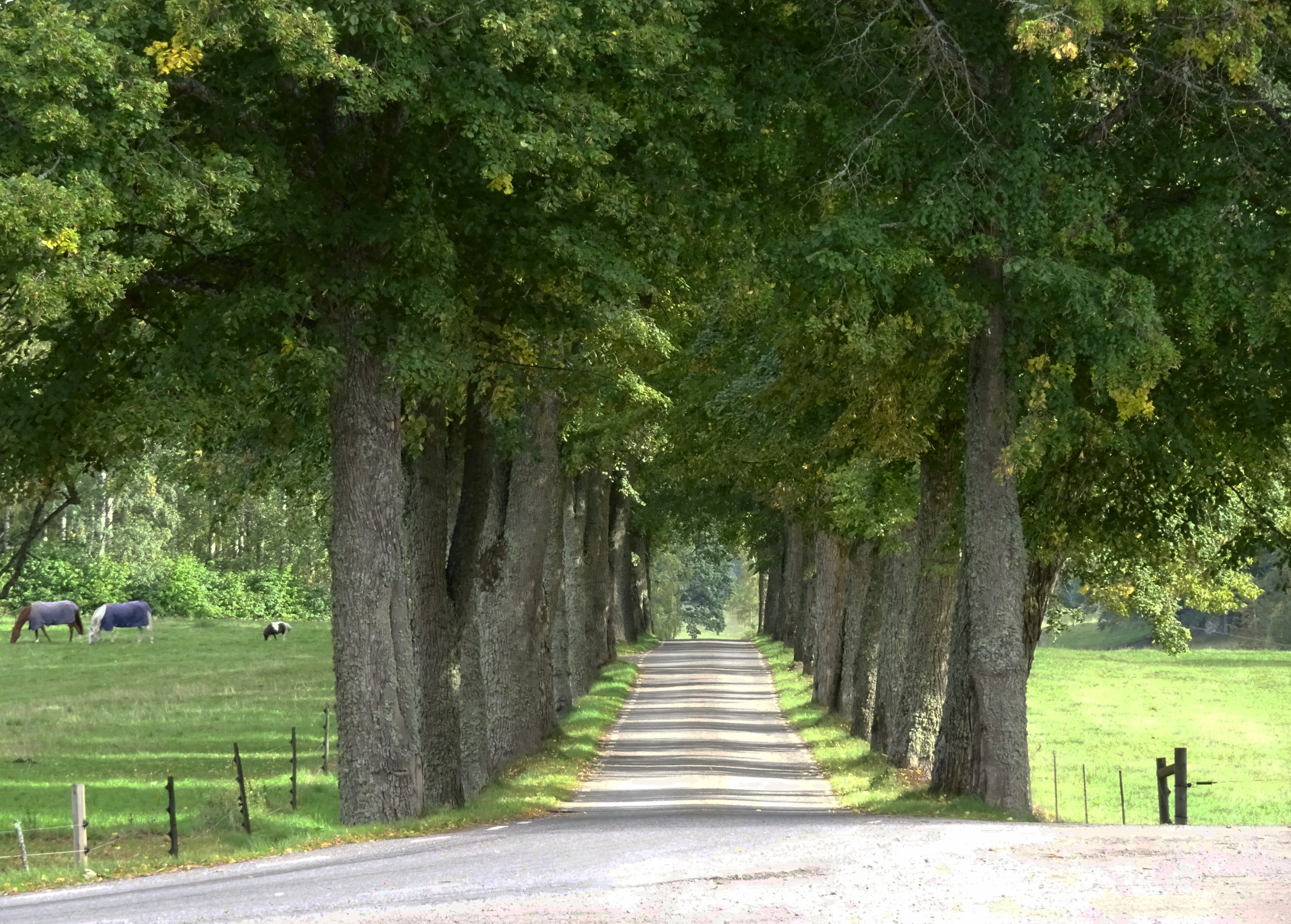 Ånhammar, allé